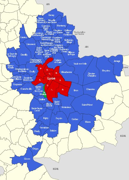 Communes du Grand Lyon, en vert La Mulatière